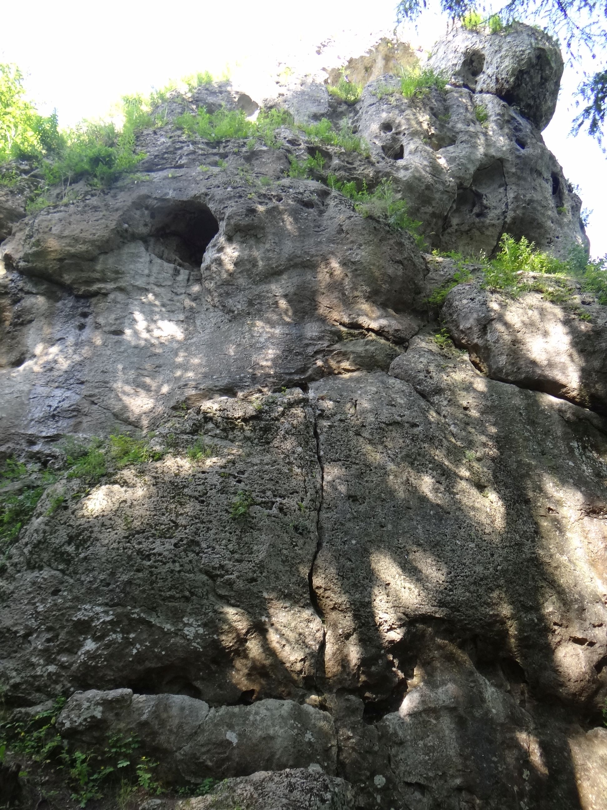 Skały pod grodem Birów w Podzamczu